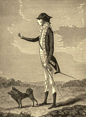 Charles Lee (general)